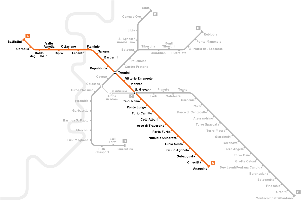 Mappa della linea A della metropolitana di Roma.